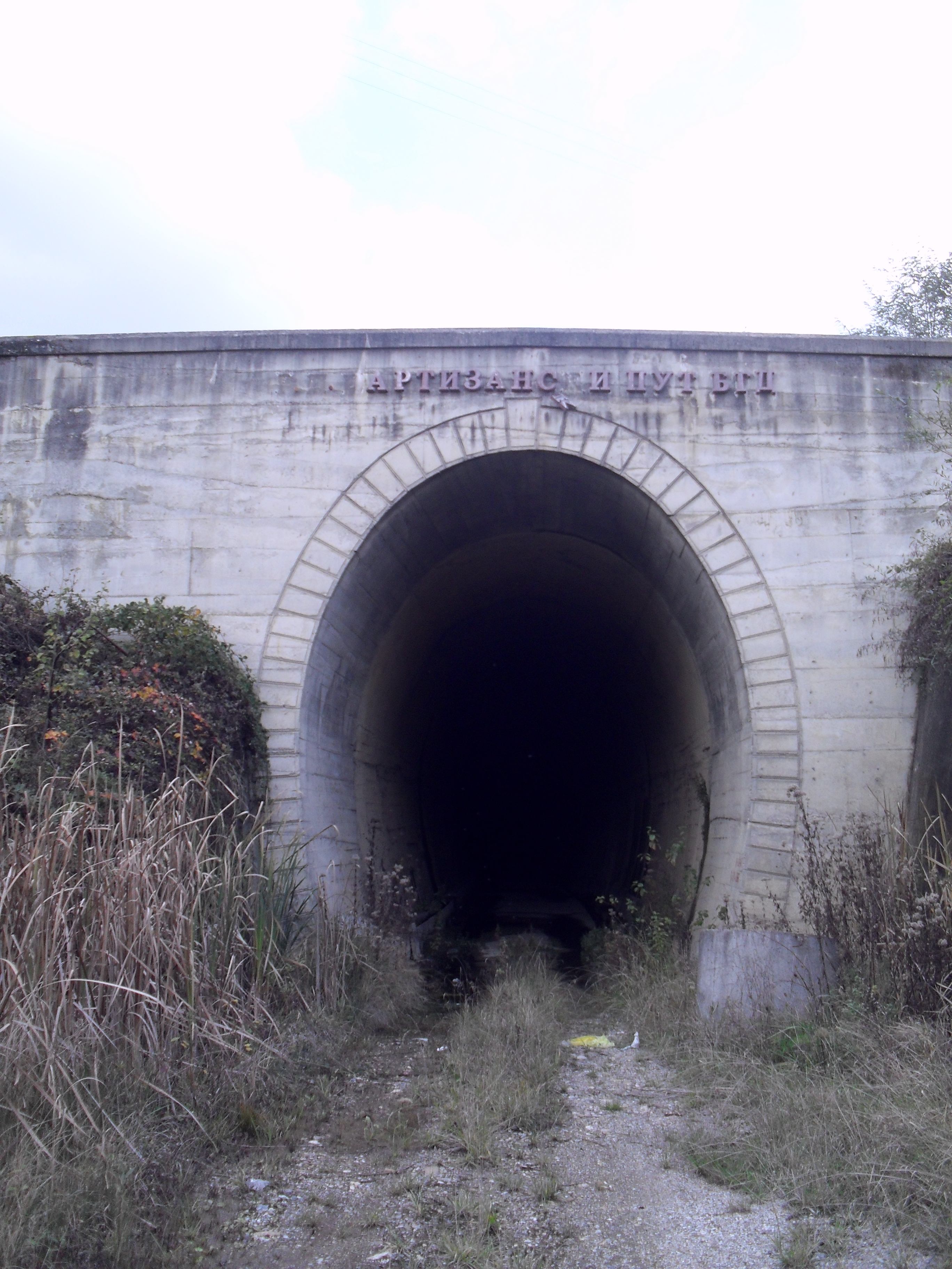 Тунел на прузи Ваљево-Лозница